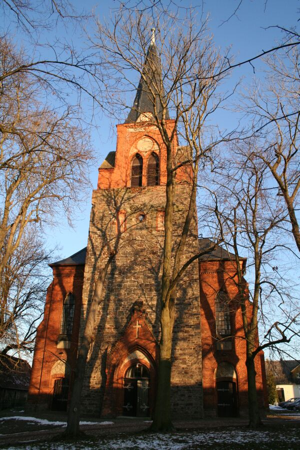 Irxleben: Kirche Dez 2005, bild selbst gemacht